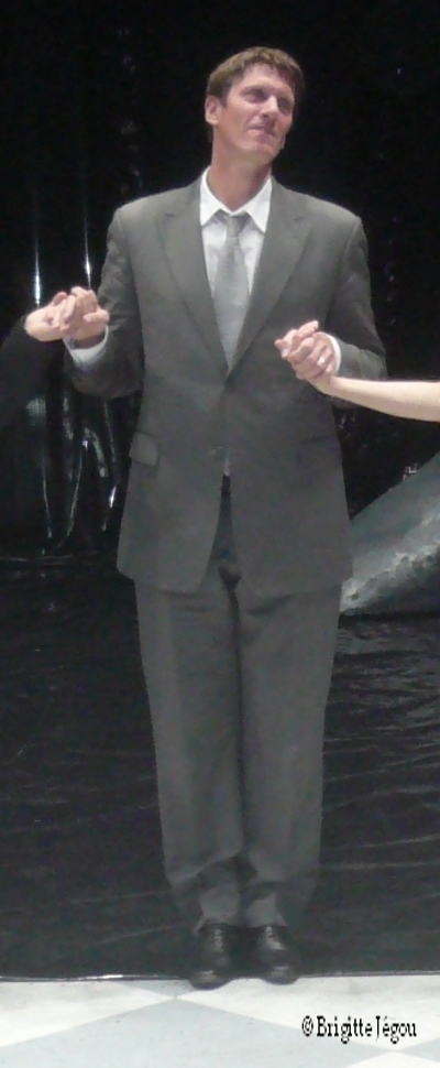 Philippe Girard, à la fin des "Enfants de Saturne" d'Olivier Py, aux ateliers Berthier